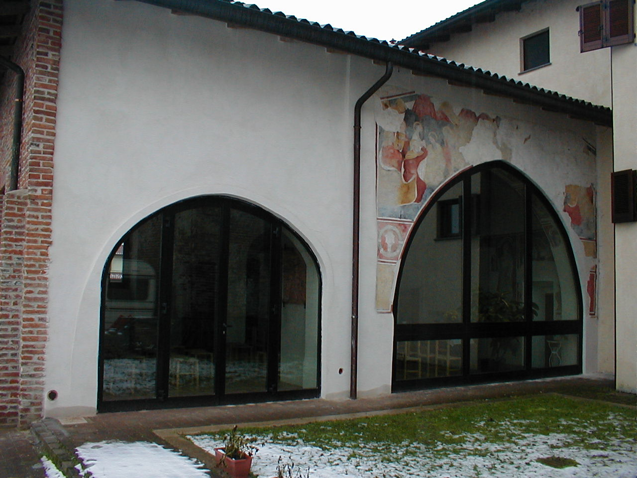 facciata esterna dopo il restauro